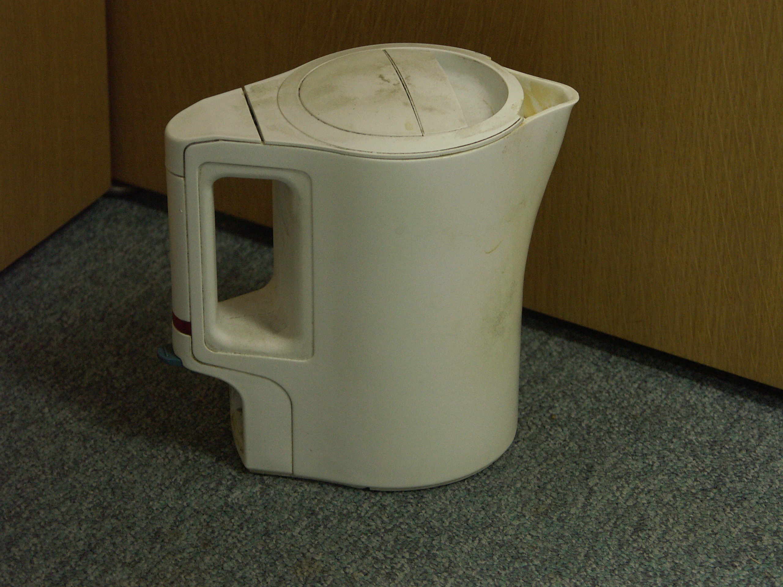 Заварной чайник Автор: User:Glaue2dk Дата: 2006-04-29